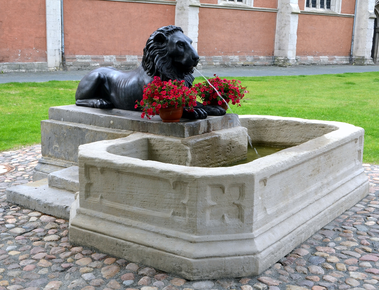 Braunschweig, Löwenbrunnen: Ansicht schräg von vorn (im Hintergrund die Katharinenkirche).